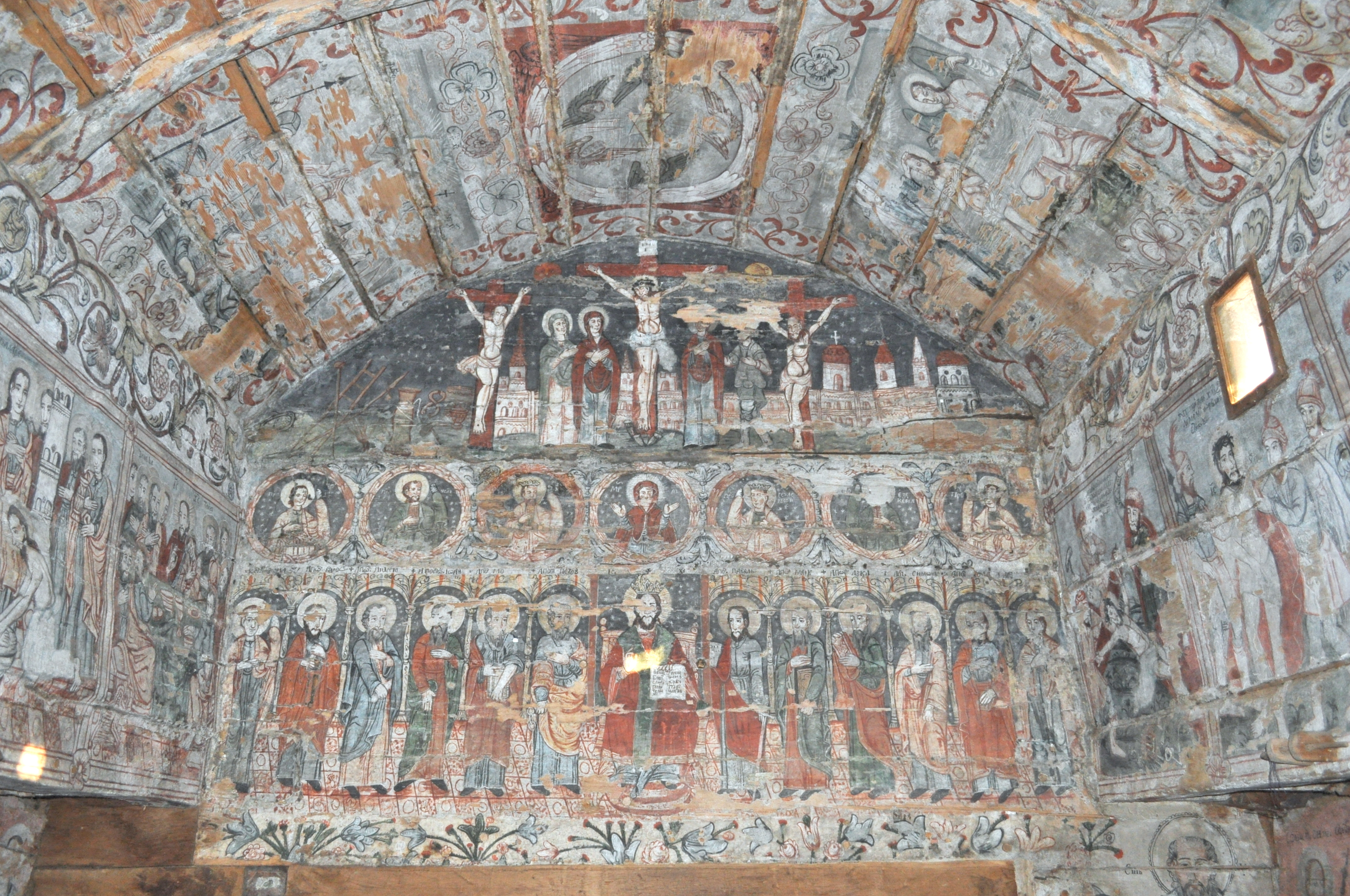 Biserica de lemn din Racâș, județul Sălaj